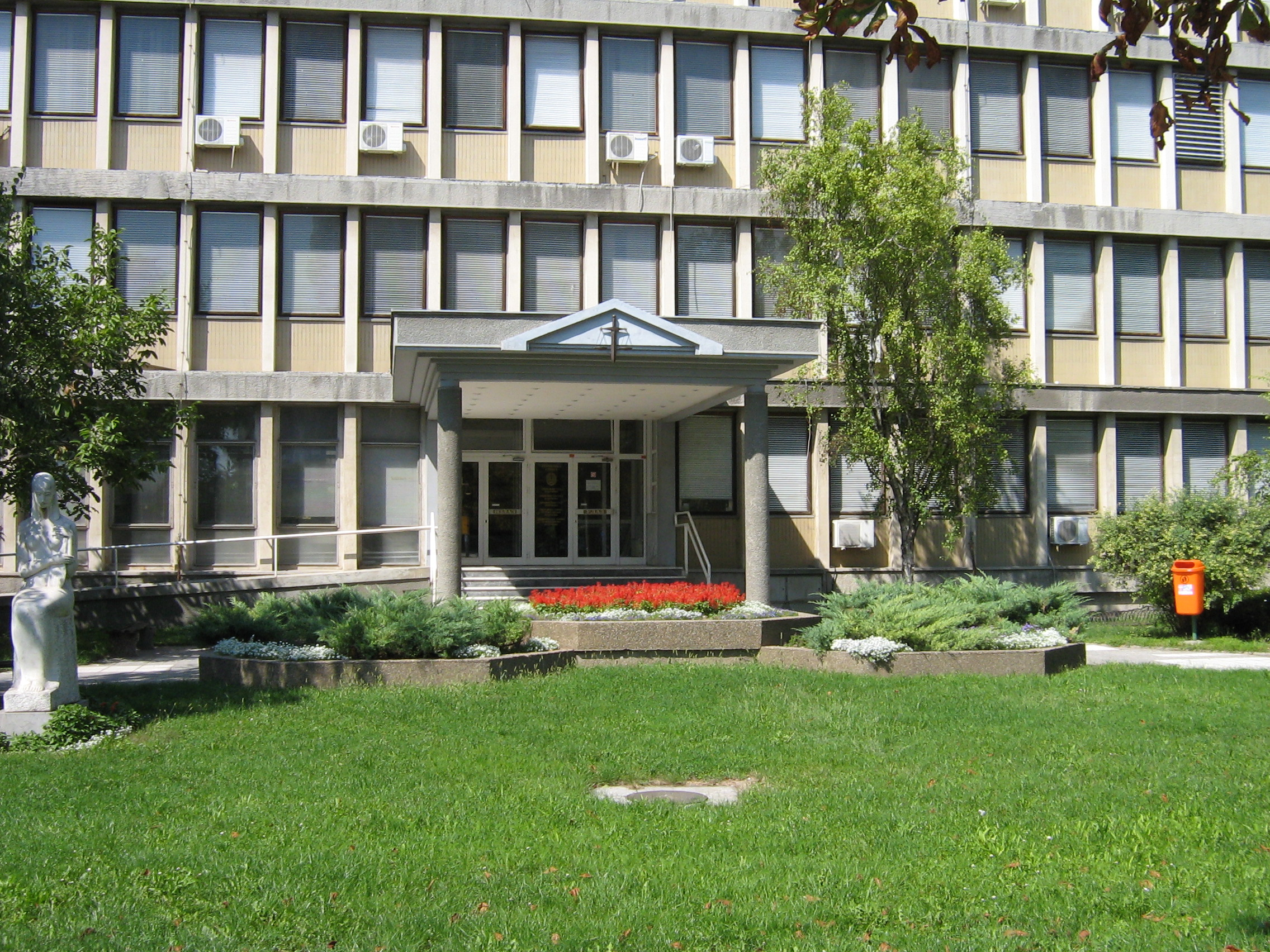 Municipal court in Pančevo